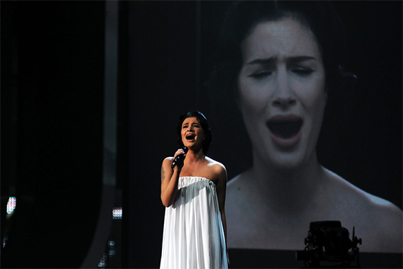 Участница конкурса «Евровидение-2009» от России Анастасия Приходько на репетиции в СК «Олимпийский.